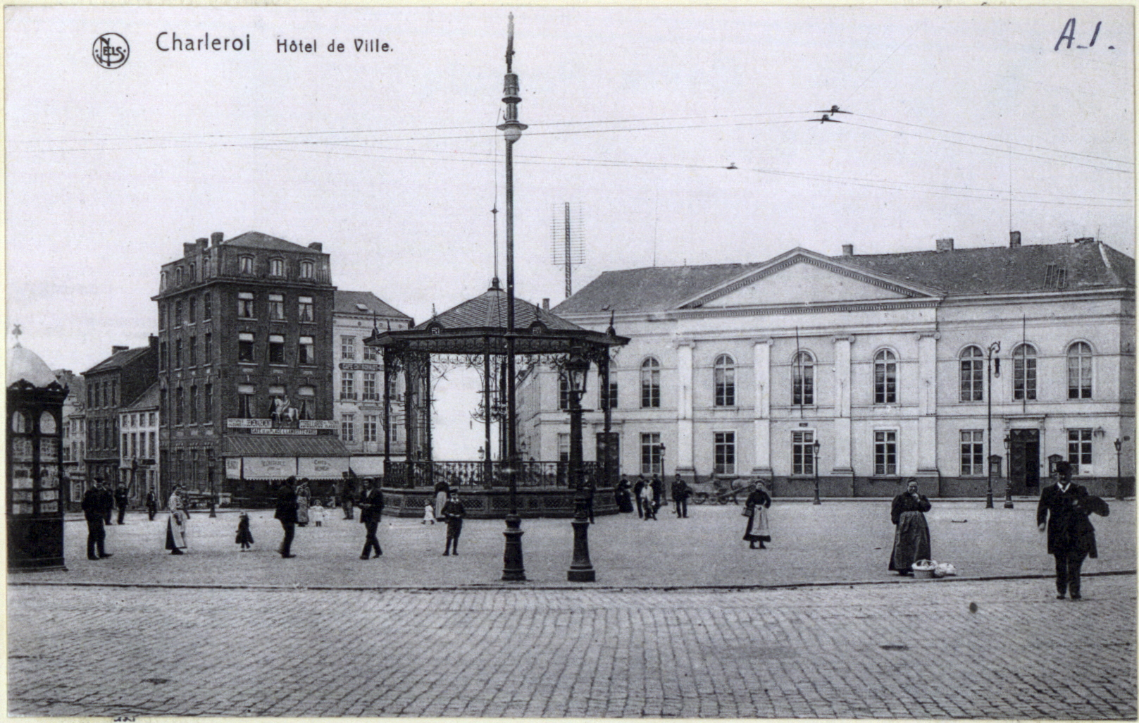 Ancien Hôtel de Ville de Charleroi, Belgique - démoli en 1931 - photo prise vers 1900